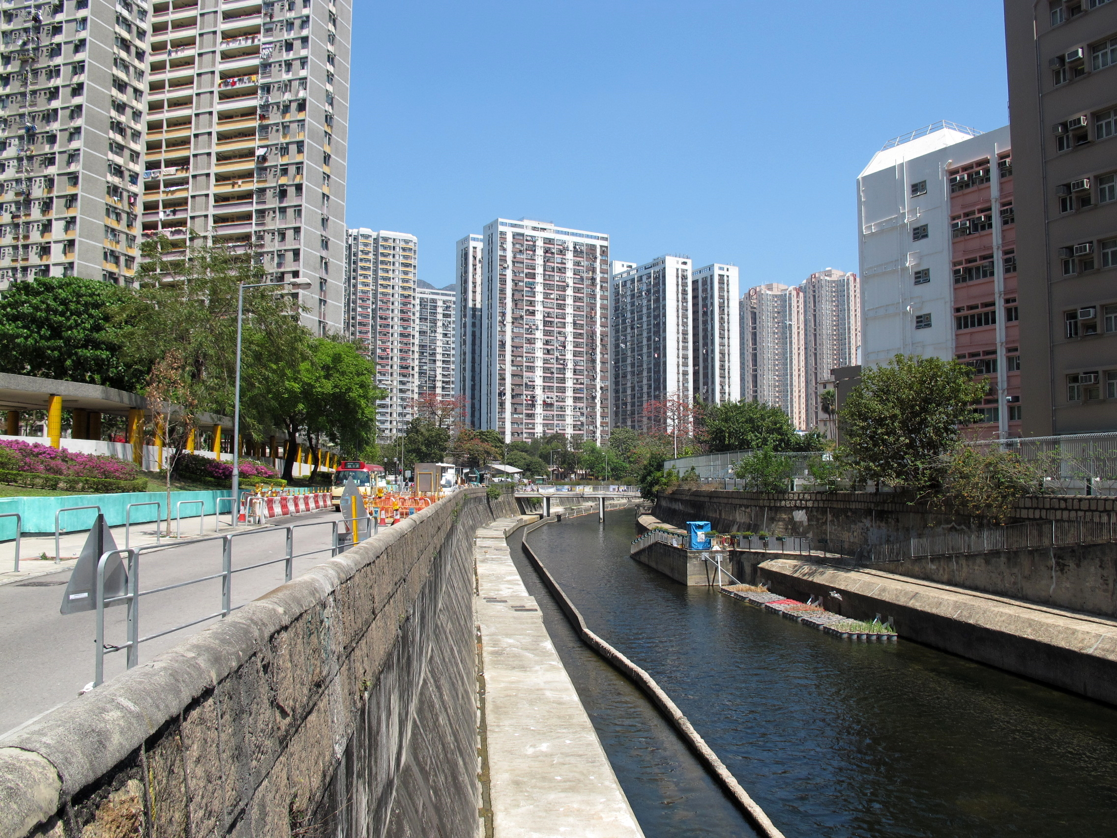 Kai Tak Nullah